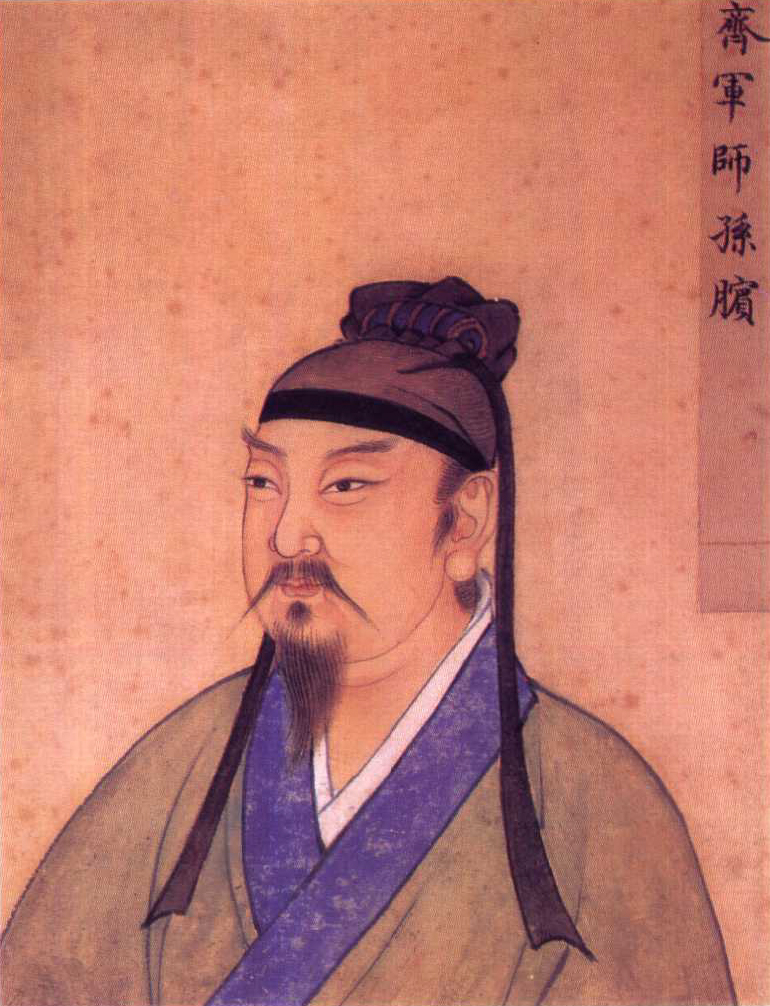 孙膑画像，明人绘